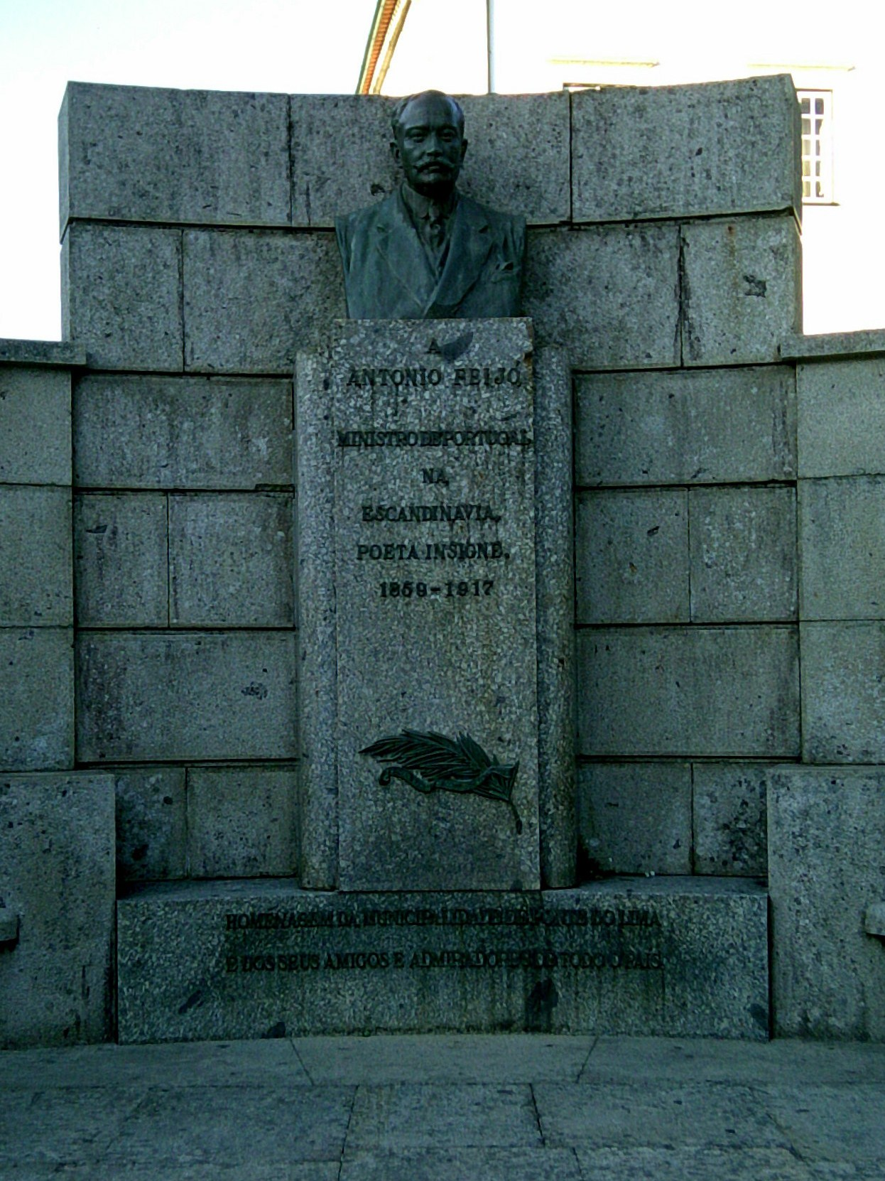 Homenagem a António Feijó (1859-1917). Ponte de Lima, distrito de Viana do Castelo, Portugal.